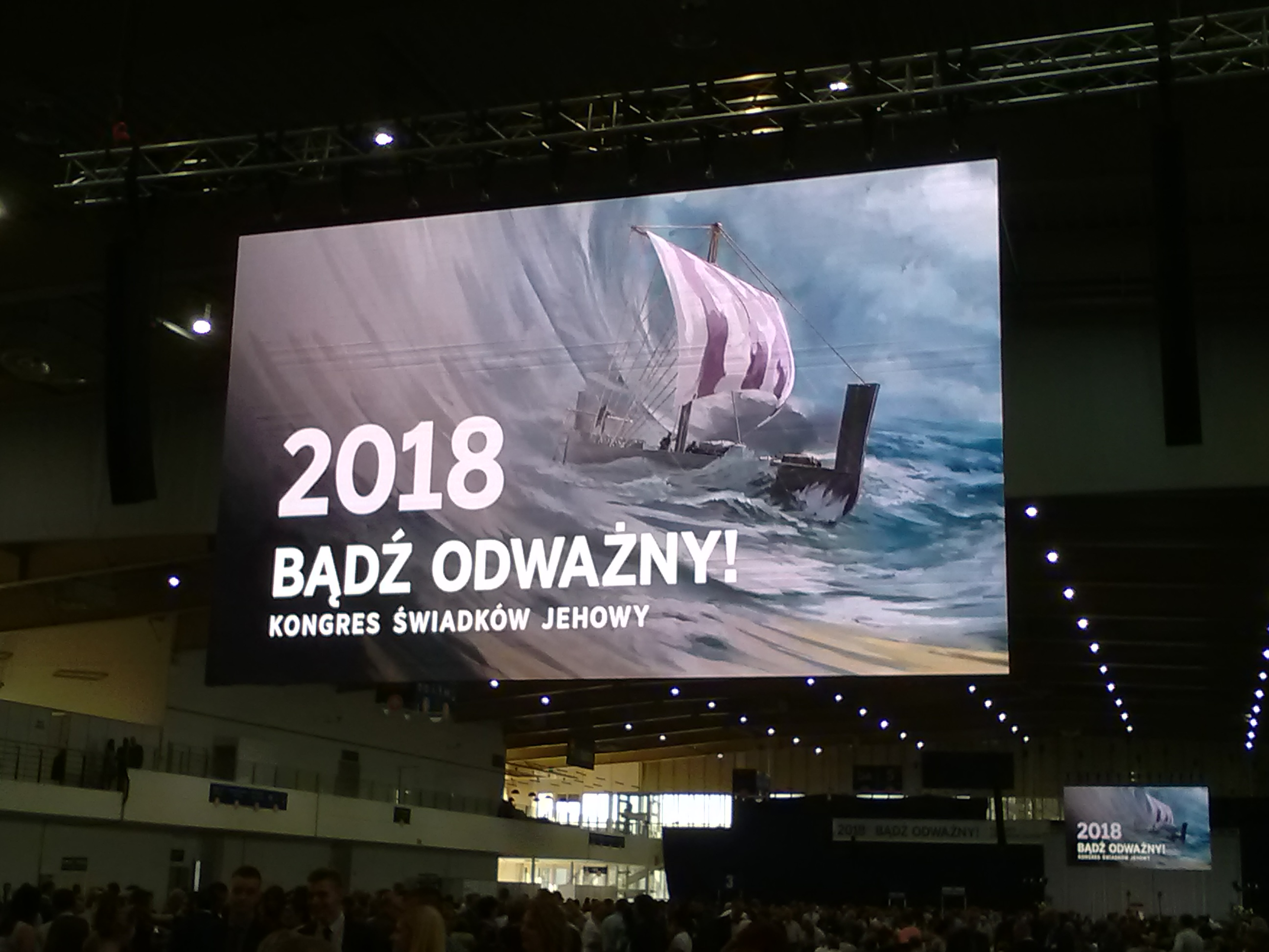 Kongres regionalny Świadków Jehowy Bądź odważny! w Poznaniu.